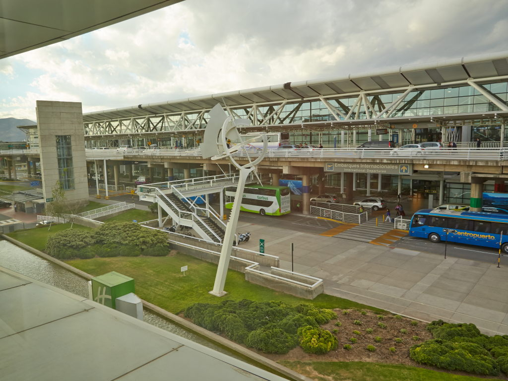 Comodoro Arturo Merino Benítez International Airport